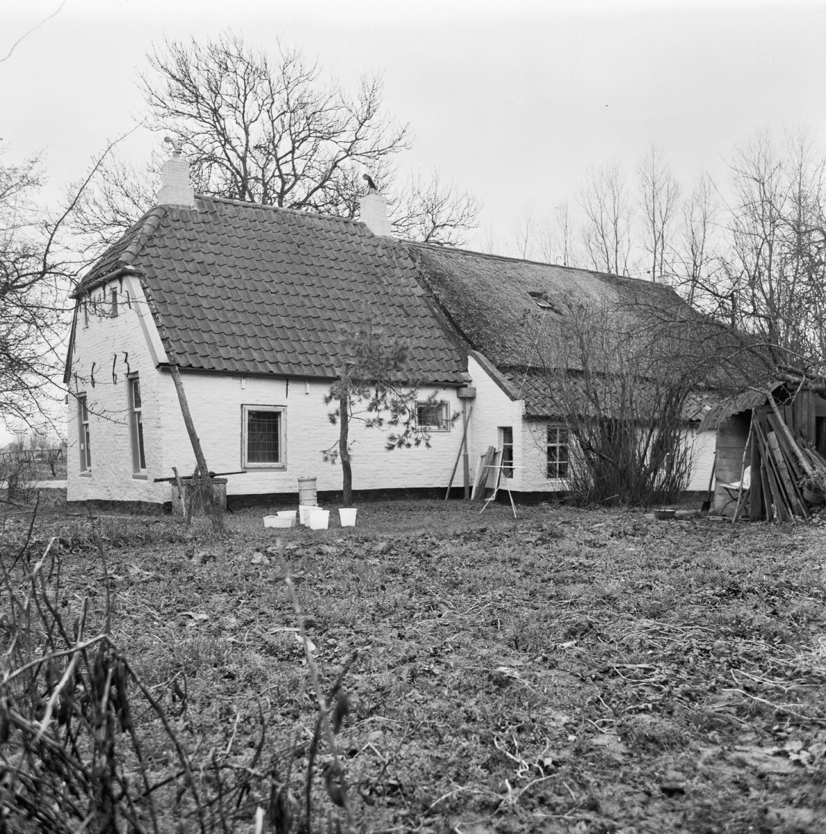 aanzicht